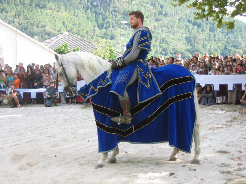 Ribadavia. Festas. Medieval. Galicia'Cabaleiro de Ribadavia'